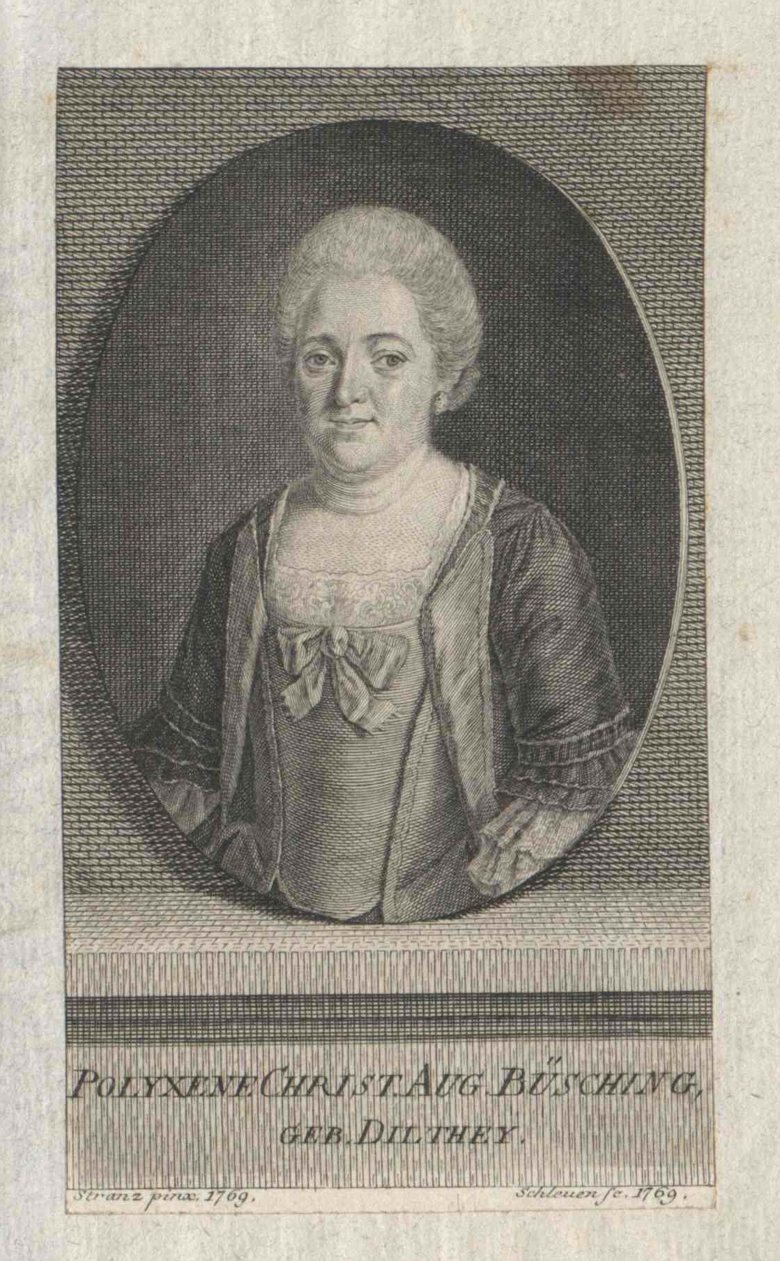 Christiana Polyxena Büsching, geb. Dillthey (1728-1777), Wien, Österreichische Nationalbibliothek, Bildarchiv und Grafiksammlung, Porträtsammlung, Inventar-Nr. PORT_00007573_01